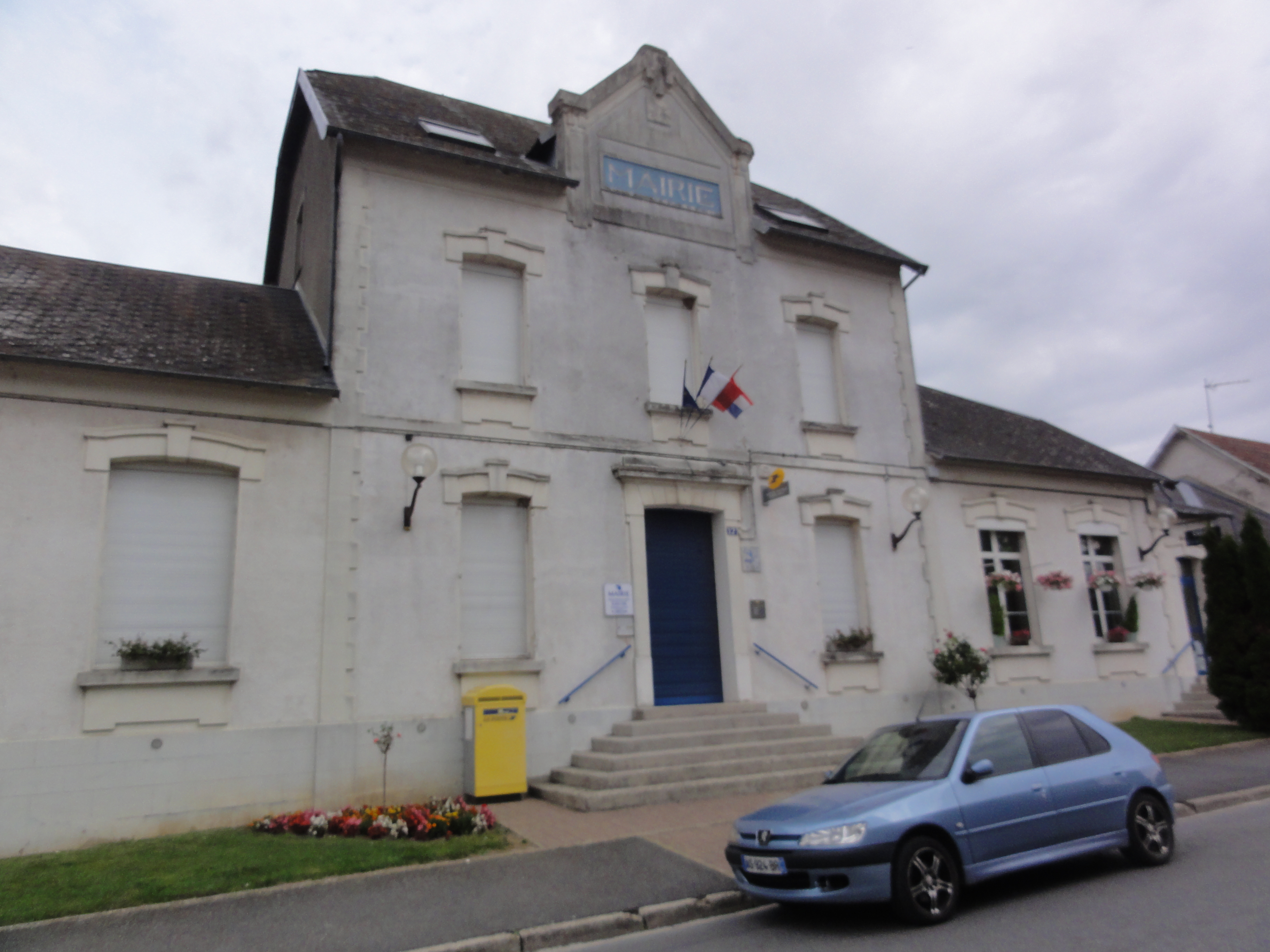 Lehaucourt (Aisne) mairie